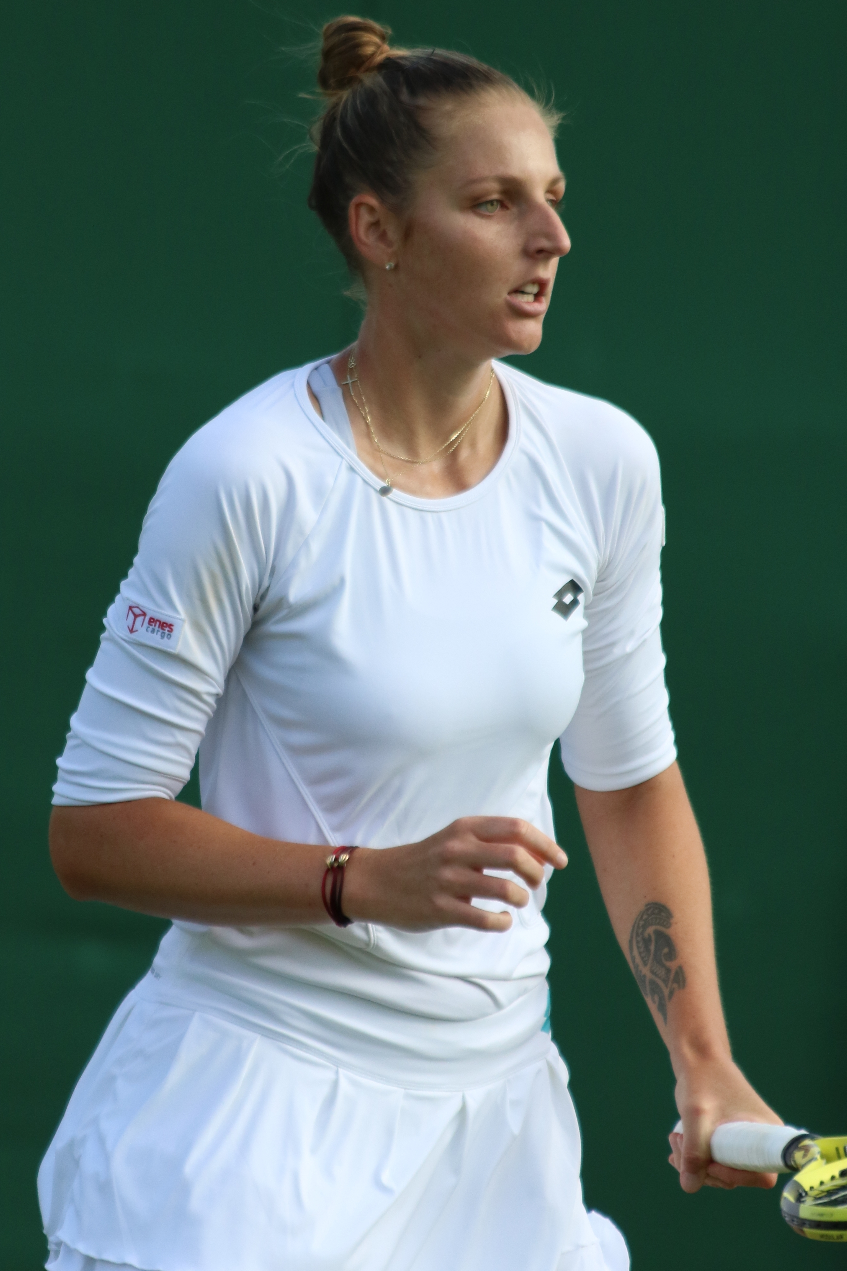 Pliskova Kr. WM19 (17)